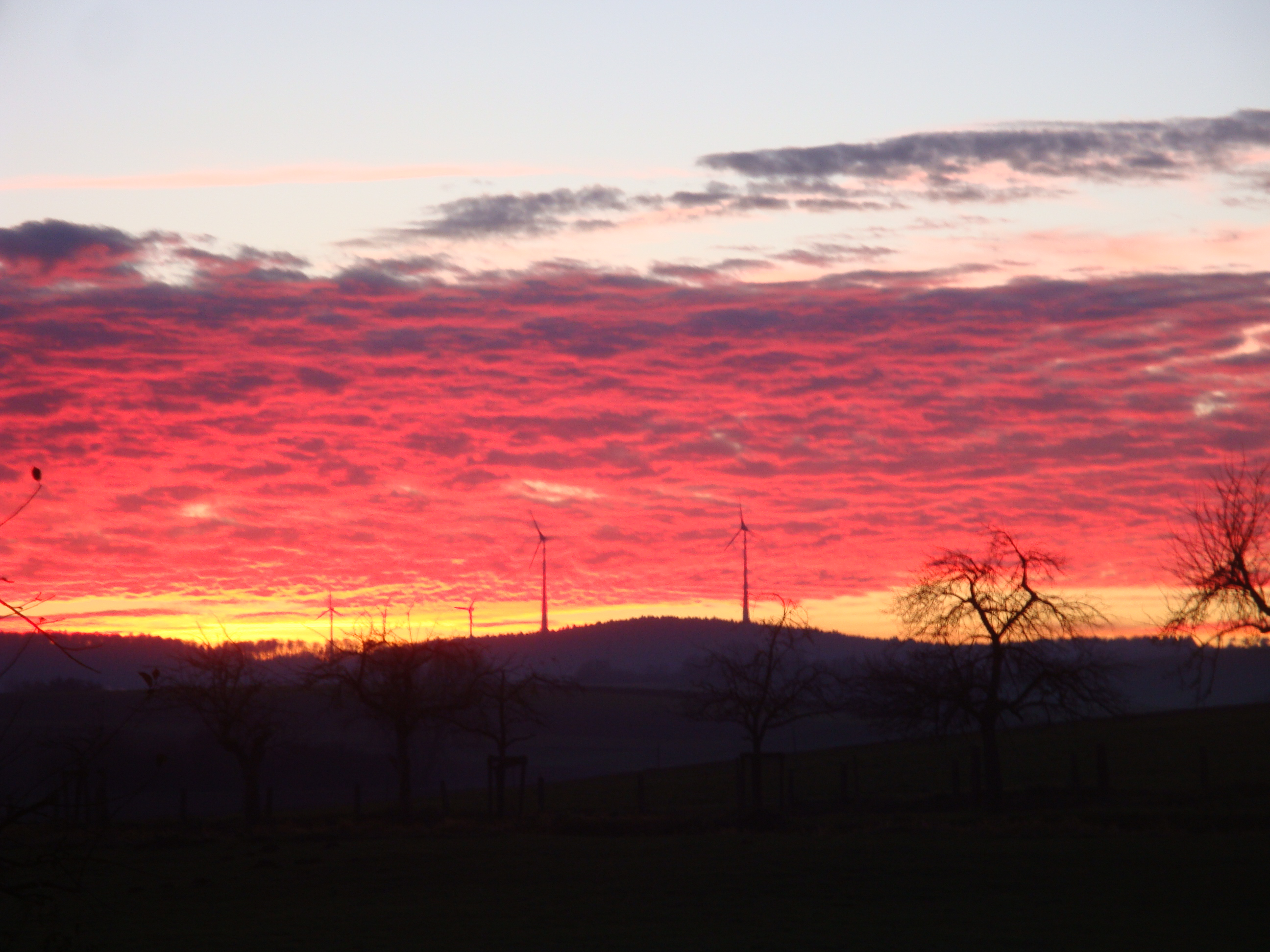 Wind turbines at Binselberg wind farm, sunset